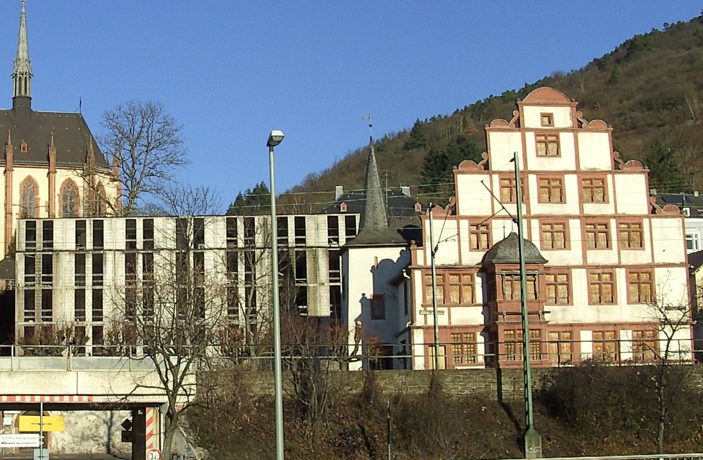 Hilchenhaus in Lorch mit Hotel - Rohbauruine